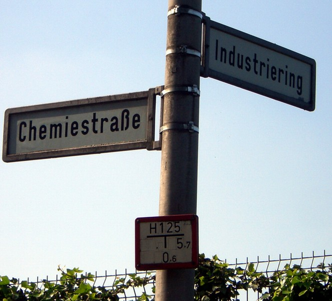 Straßenschilder „Chemiestraße“ und „Industriering“ im Viersener Gewerbegebiet Mackenstein. Selbst fotografiert.